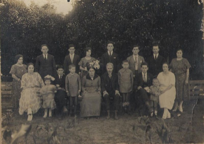 Jacó Batista Uliano e Família. Fotografia cedida por Estela Maria Kindermann Bianchini, Braço do Norte/SC. Acervo da família